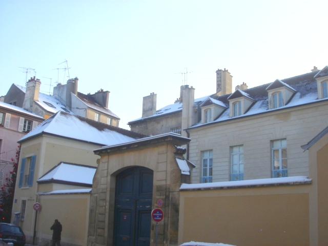 Hôtel particulier, fin XVIIe siècle, à Saint-Germain.